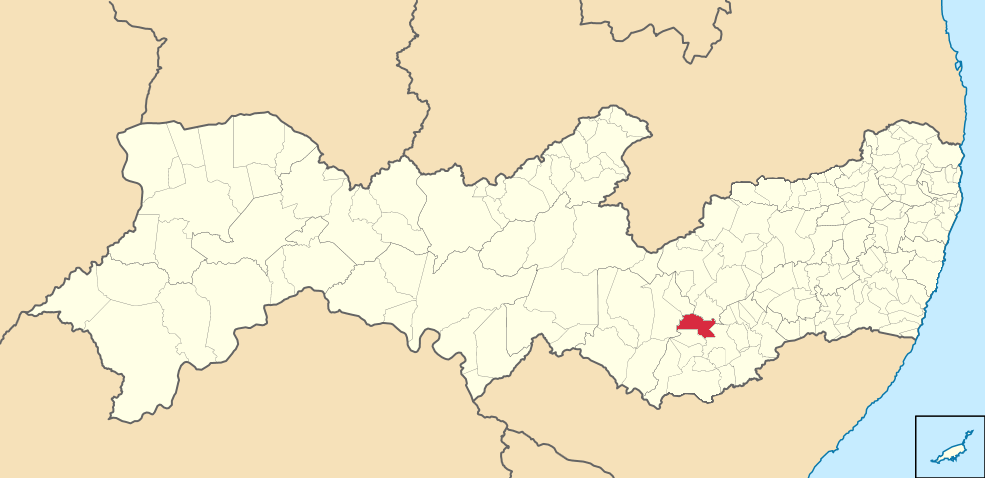 Mapa de Caetés (2)